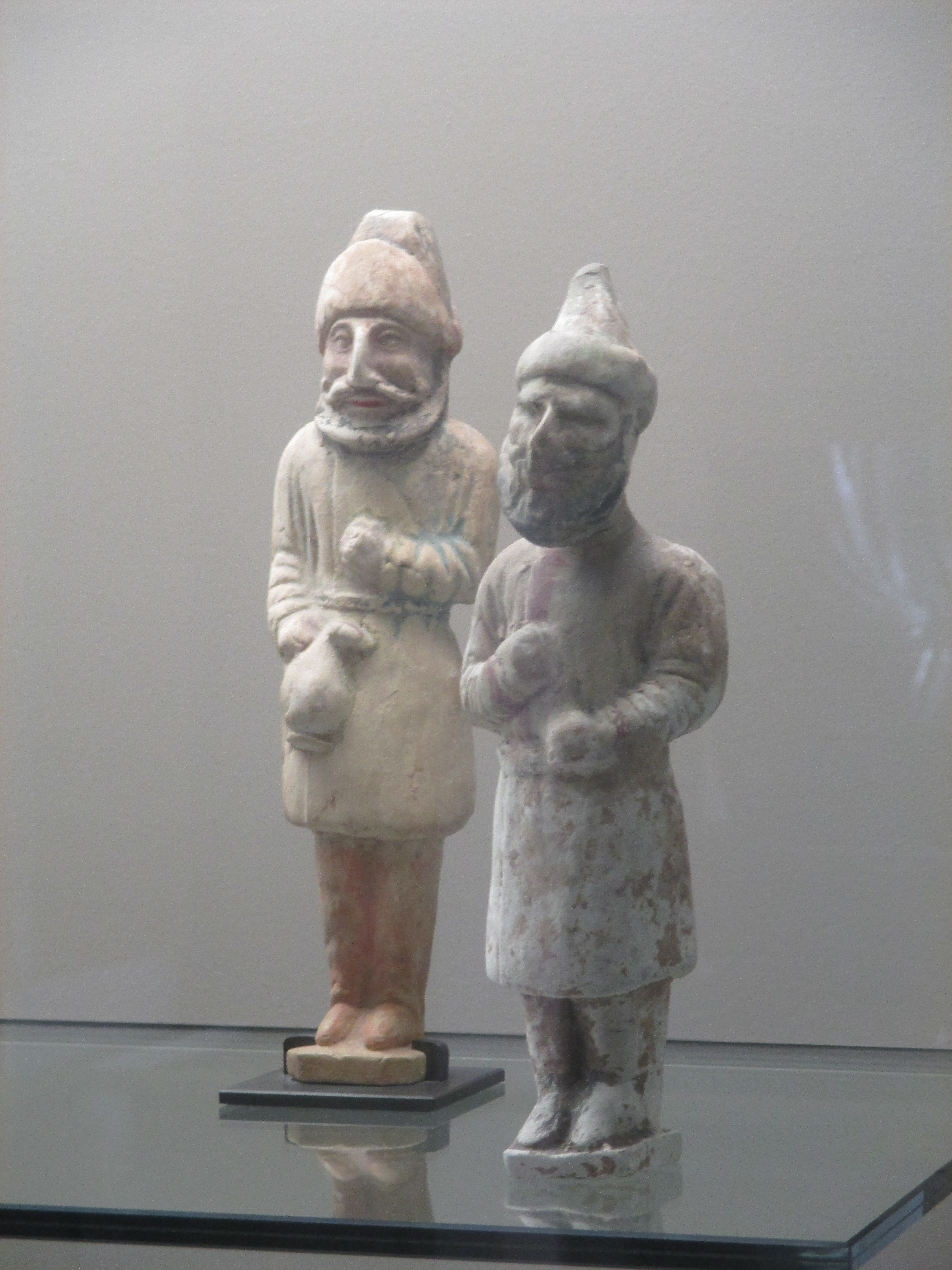 Musée Cernuschi (Paris). Palefreniers barbares sogdiens. Dynastie Tang.